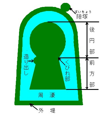 Aufbau eines schlüssellochförmigen Kofun mit Tsukuridashi